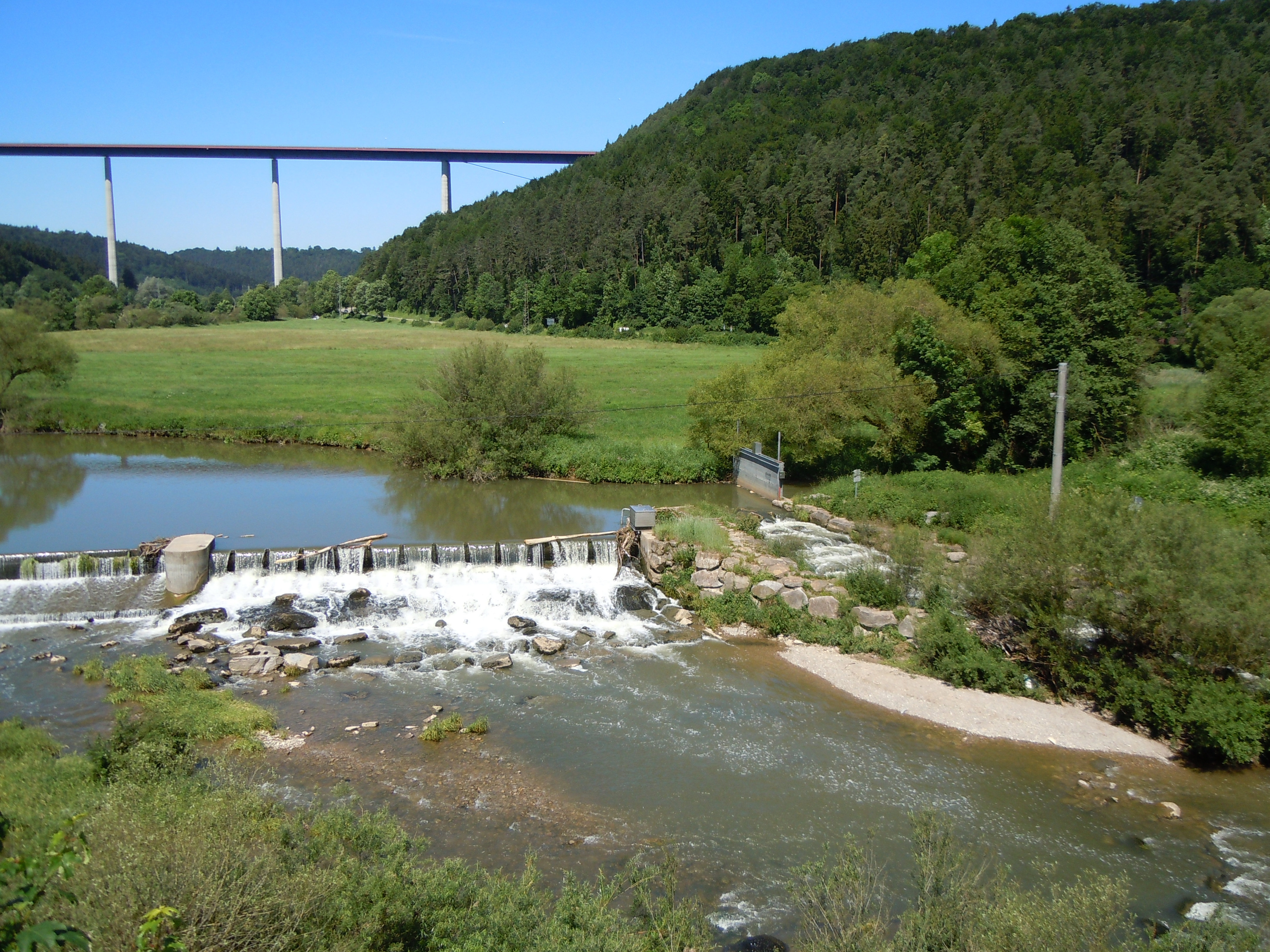 Neckarwehr am Wohnplatz Eyach. Rechts geht der Kanal zur Weitinger Mühle ab. Im Hintergrund die Neckartalbrücke Weitingen der A 81.